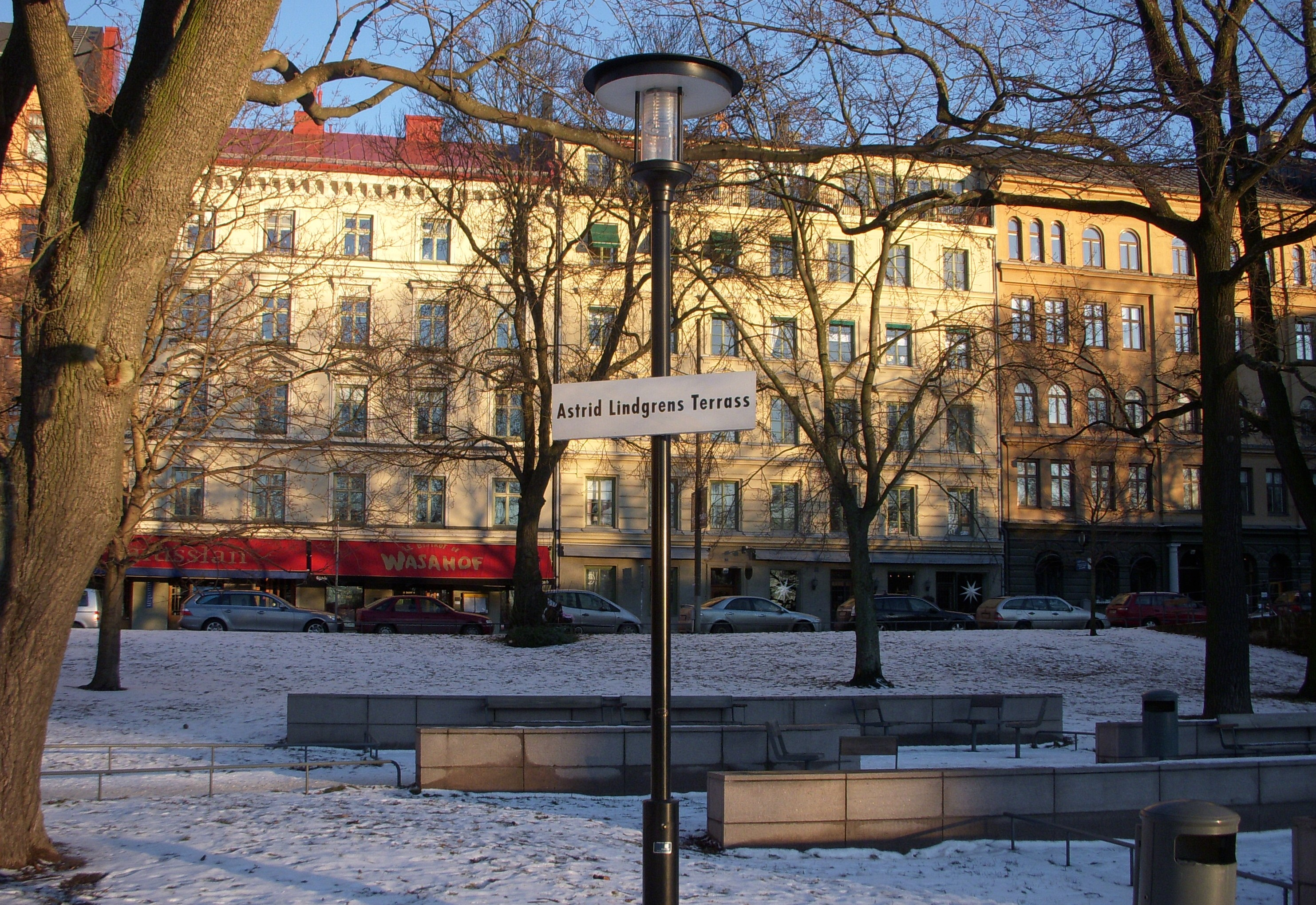 Astrid Lindgrens Terrass i Vasaparken i Stockholm, i bakgunden Astrid Lindgrens bostadshus vid Dalagatan.